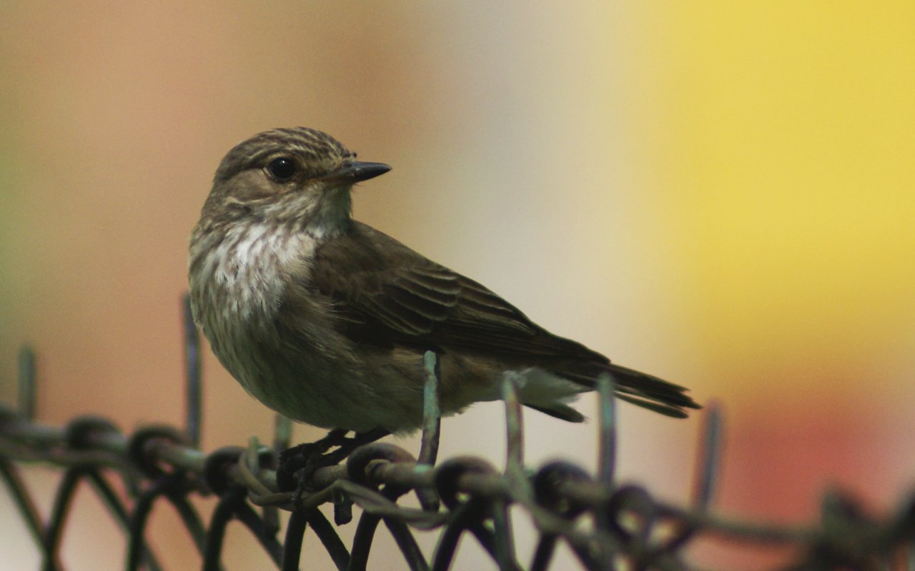 Muchołówka szara / Muscicapa striata / Spotted Flycatcher